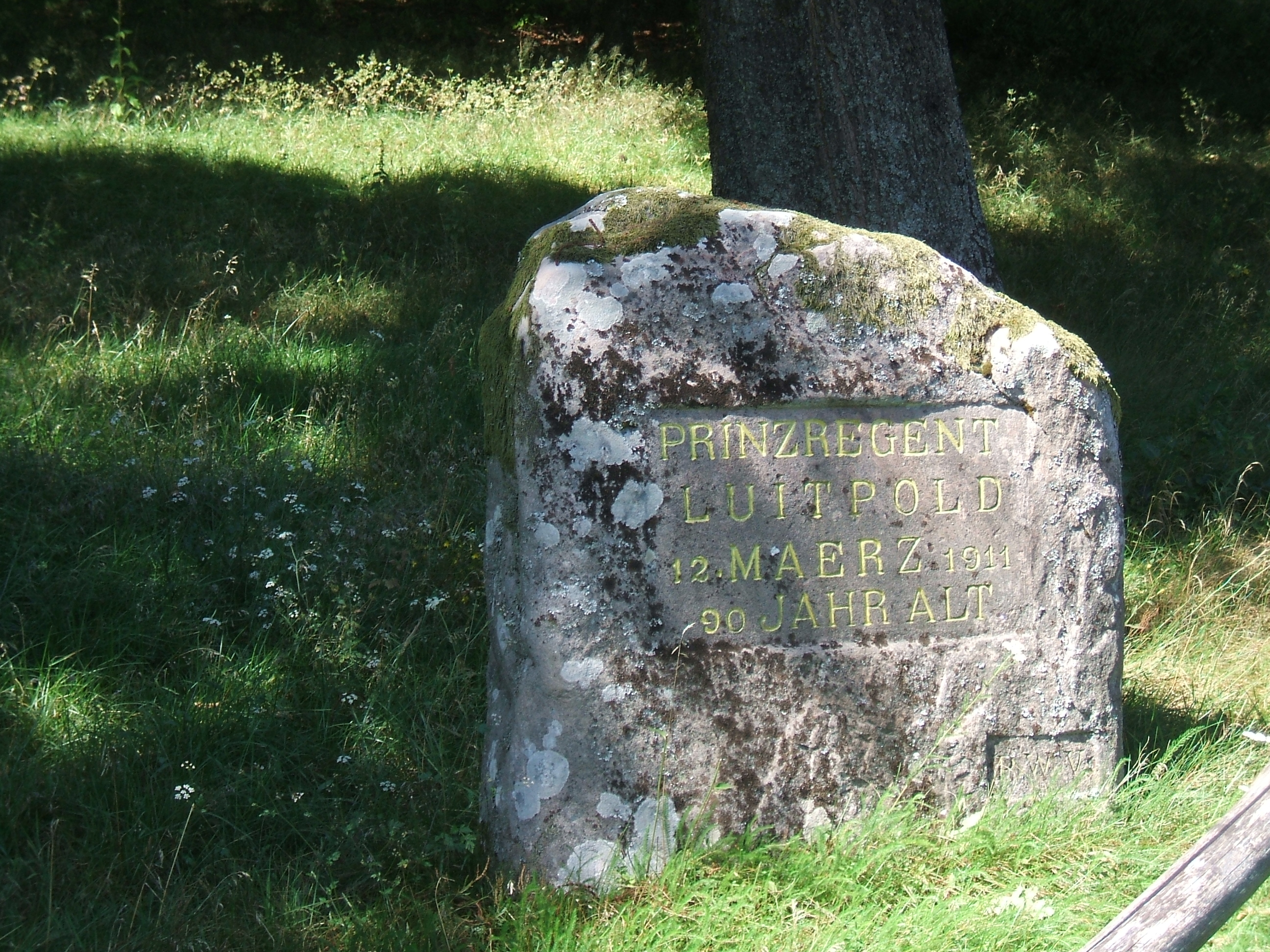 Ritterstein Nummer 70, Prinzregent Luitpold...